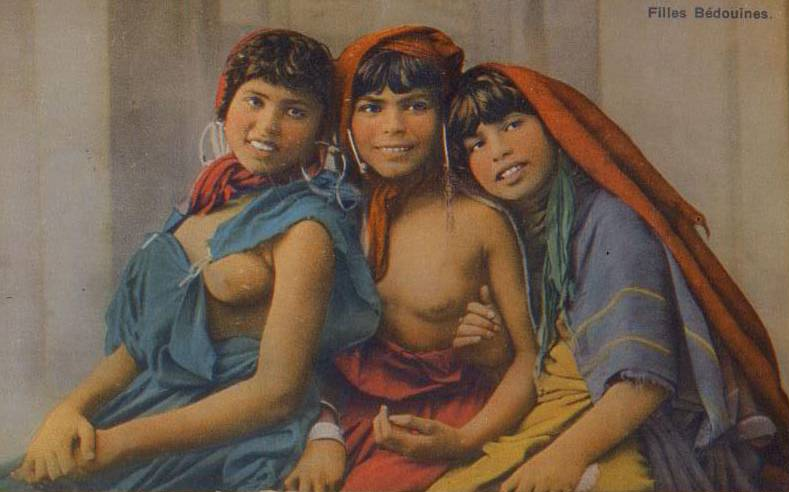 J. Garrigues postcard